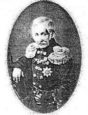 Аркас Захарій Андрійович